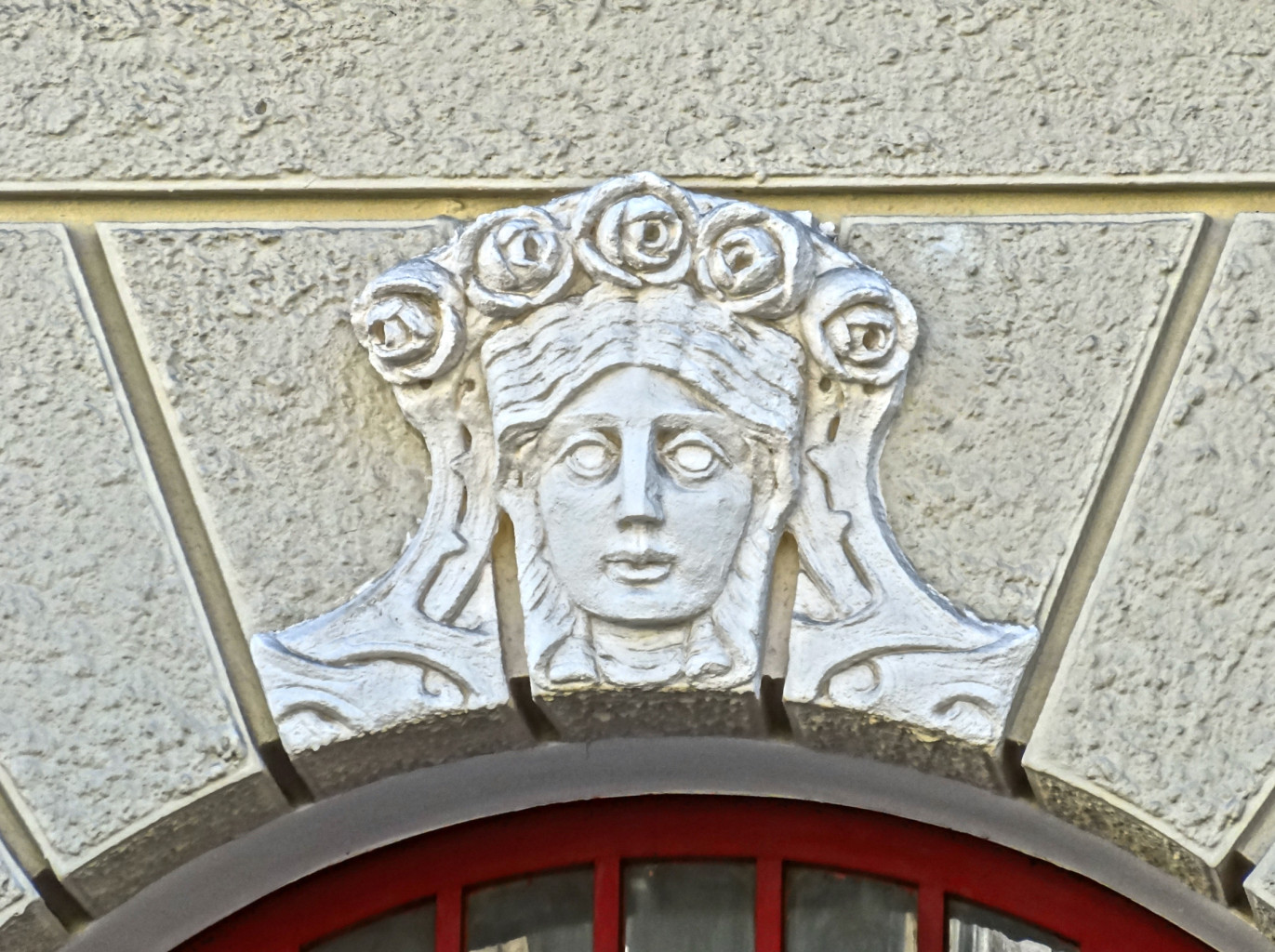 Kamienica przy ul. Cieszkowskiego 13-15 w Bydgoszczy (1902-1903 Fritz Weidner)